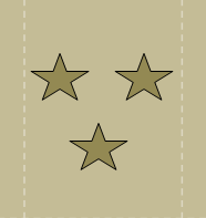 ՀՀ ԶՈՒ գնդապետ զինվորական կոչում